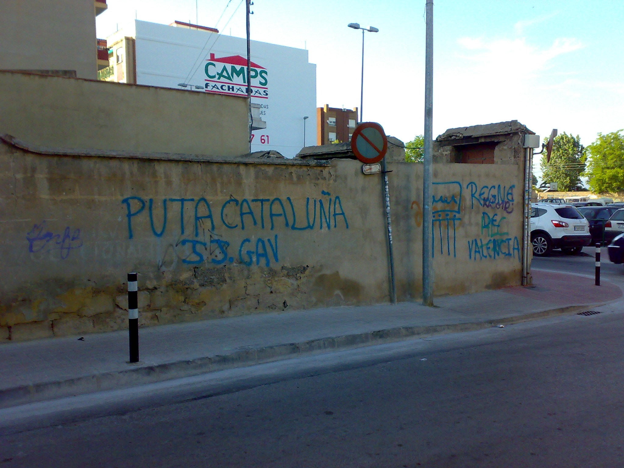 Pintada de las JJ.GAV en Burjassot, Valencia ("Puta Cataluña" - Regne de Valencia [sic])